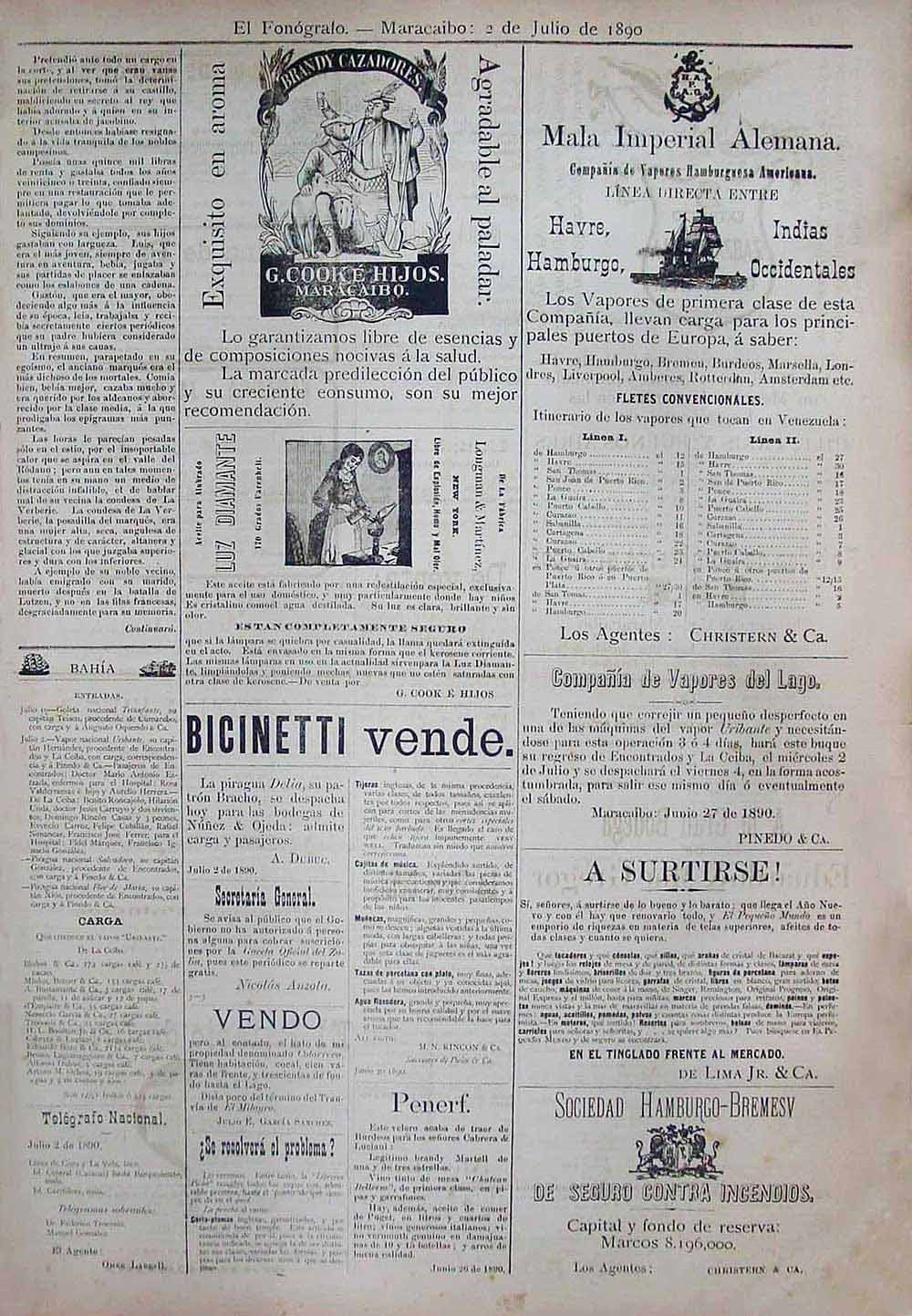 Página interior del diario "El Fonógrafo" de Maracaibo. Edición del 4 de julio de 1890